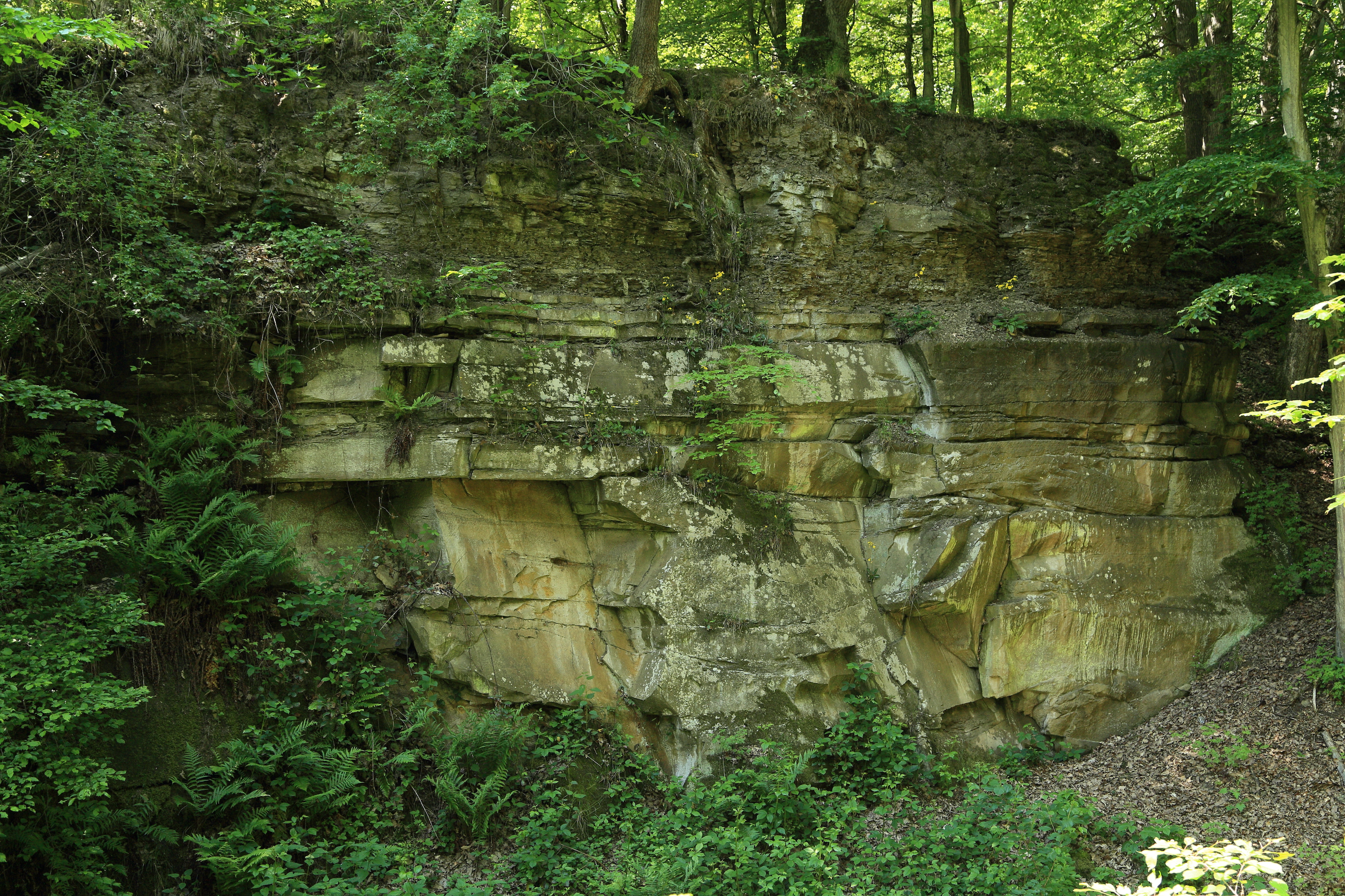 Ehemaliger Sandsteinbruch W von Hoechberg Bayerns schönste Geotope Nr.: 86; Geotop-Nummer: 679A007 6225GT000005 Höchberg Würzburg 6225 Würzburg Süd R: 4346095 H: 5518604 Westliche Fränkische Platten